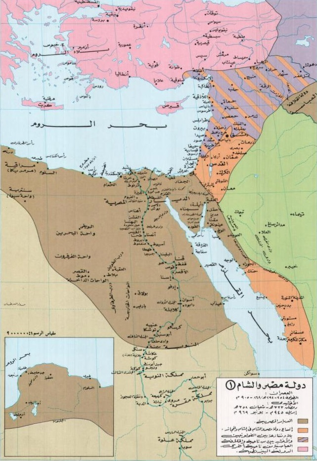 خارطة تُبيِّن حُدود الدولتين الطولونيَّة والإخشيديَّة في مصر والشَّام.